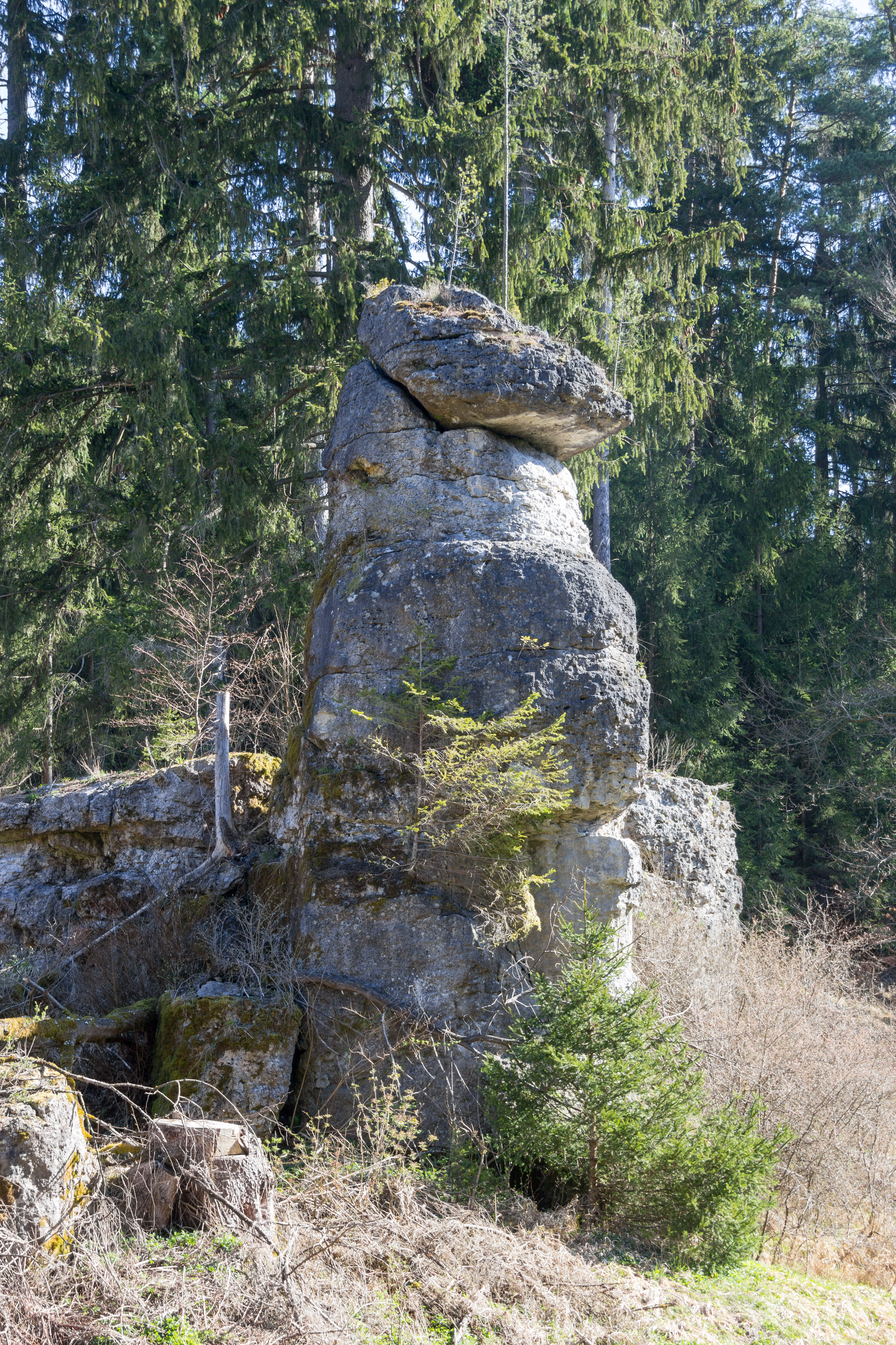 Schmierhüttenfelsen, Felsturm, Geotop, Naturpark Fränkische Schweiz-Veldensteiner Forst